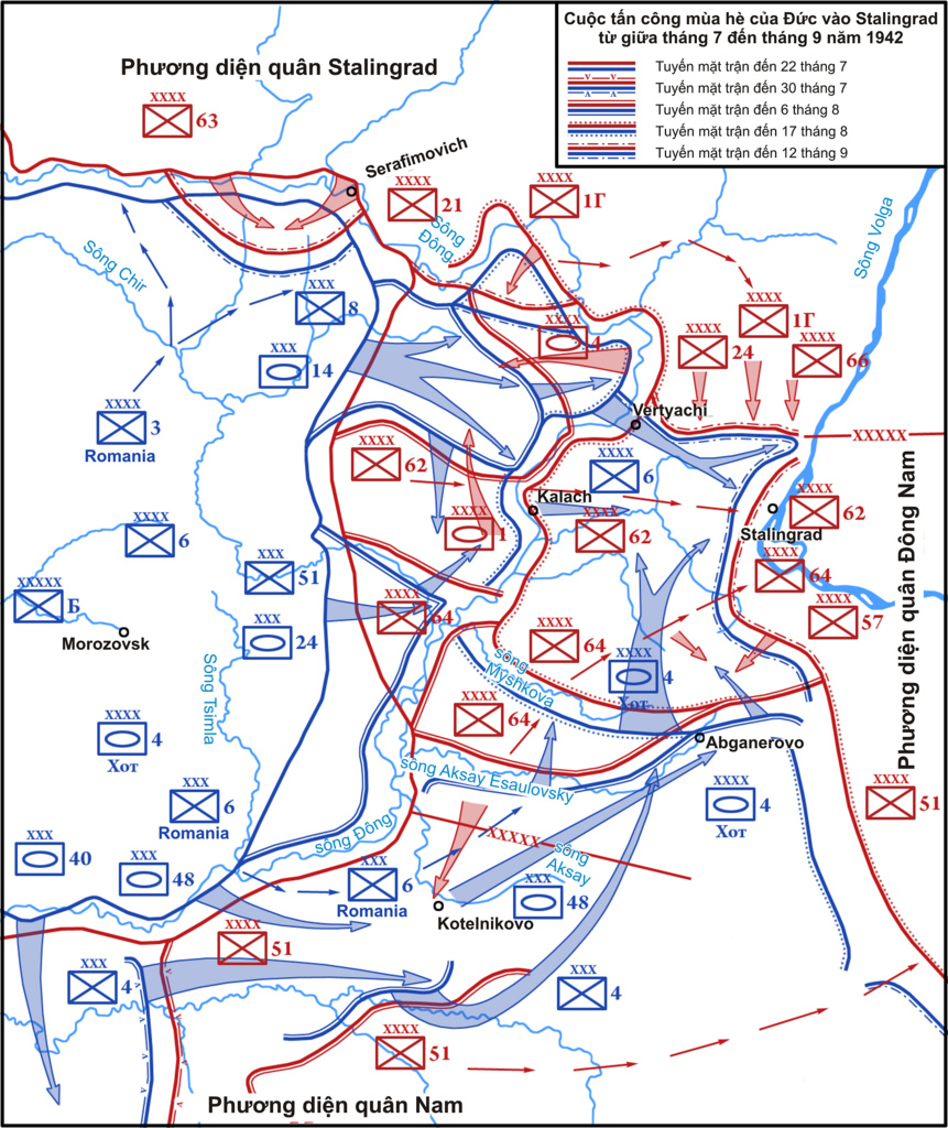 Bản đồ diễn biến chiến sự tại khu vực Stalingrad từ tháng 7 đến tháng 9 năm 1942. Chú thích ký hiệu Màu đỏ: quân Liên Xô Màu xanh da trời: quân Đức quốc xã và đồng minh Hình chữ nhật có gạch chéo: bộ binh Hình chữ nhật có hình elips bên trong: thiết giáp Chữ "X" phía trên các hình chữ nhật: X là trung đoàn XX là sư đoàn XXX là quân đoàn XXXX là tập đoàn quân XXXXX là cụm tập đoàn quân Б: cụm tập đoàn quân B XOT chỉ tập đoàn quân xe tăng 4 của tướng Đức Hermann Hoth